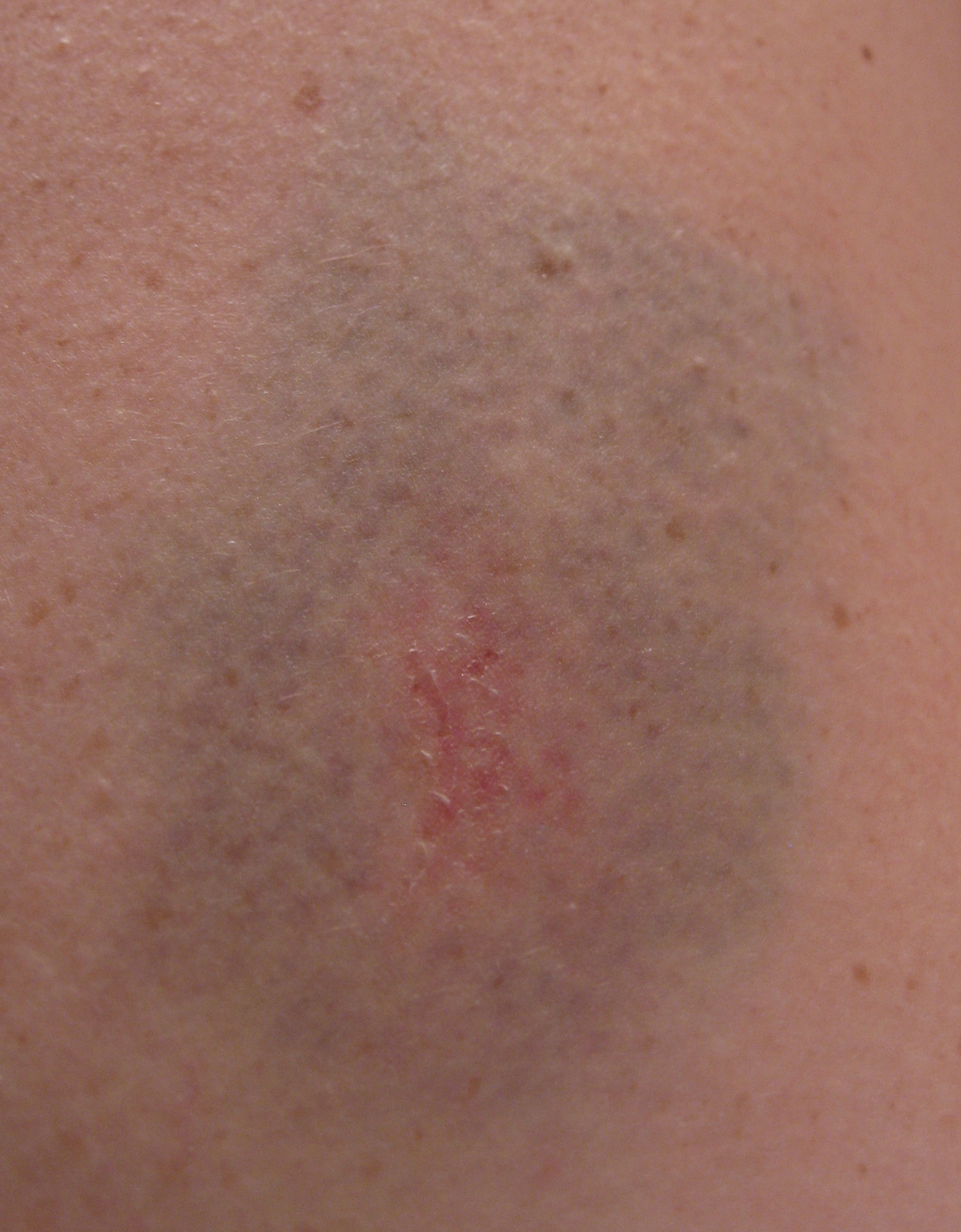 Bruise from bicycle accident